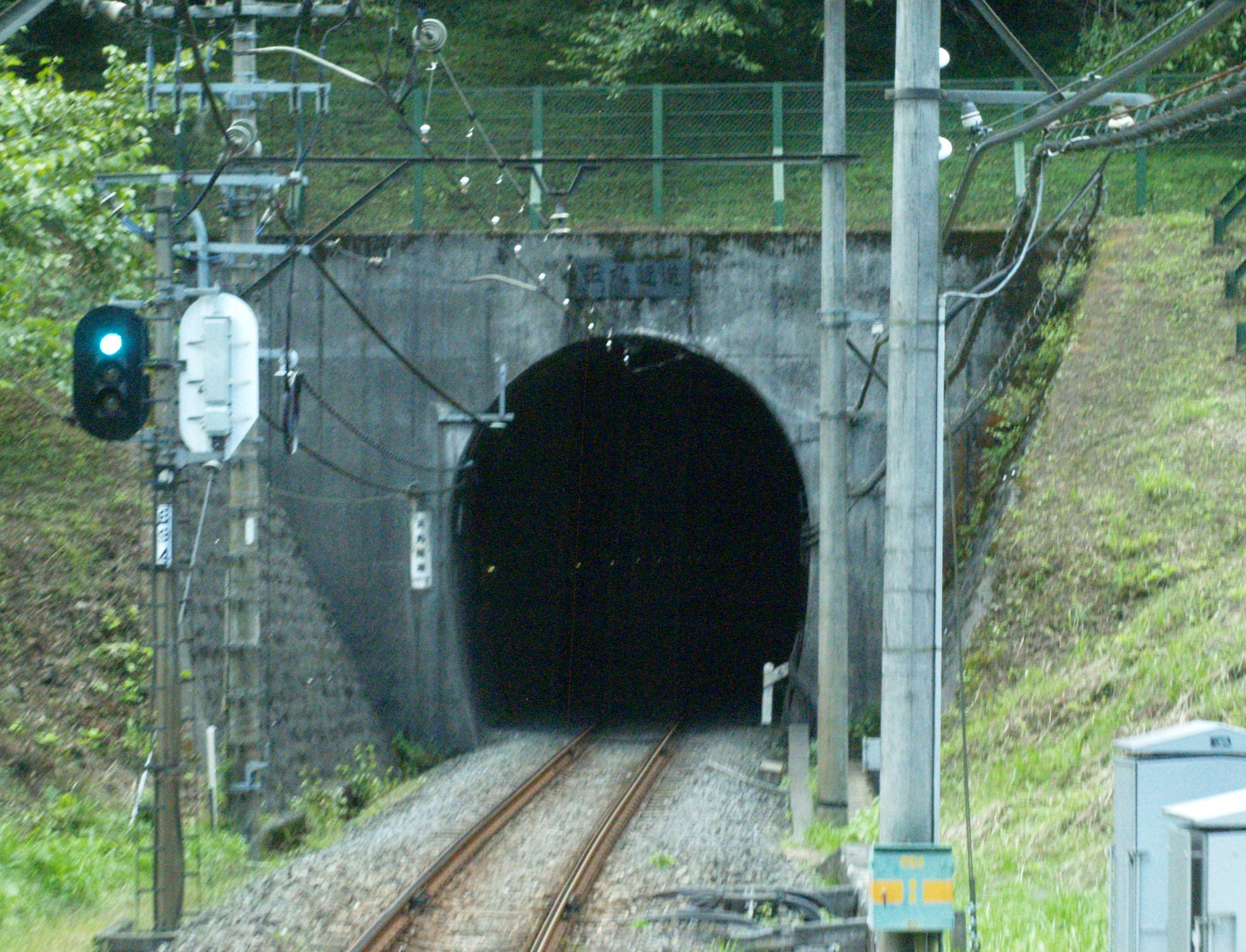 西武秩父線正丸トンネル芦ヶ久保側入口